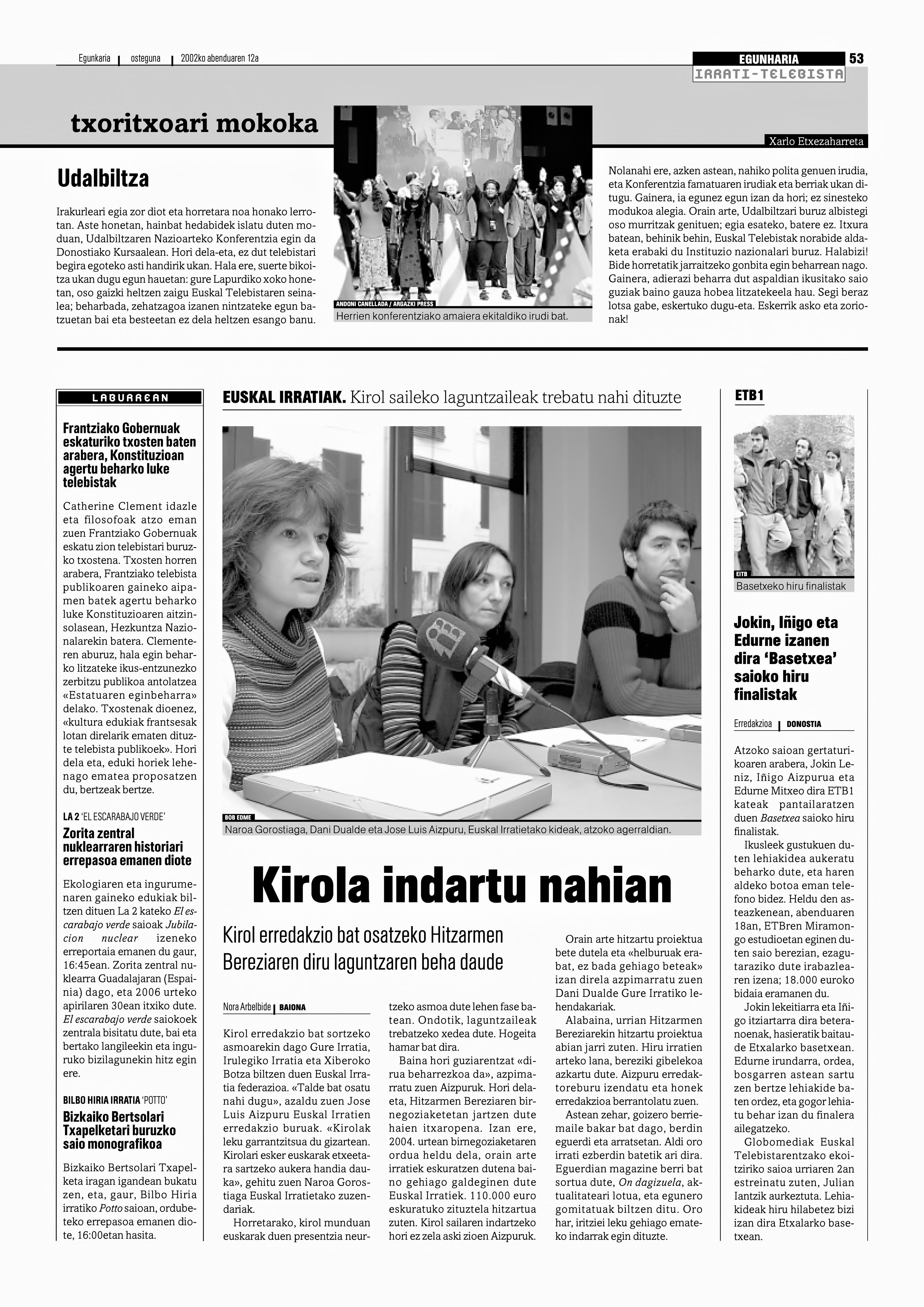 Euskal Irratietako kideak prentsaurreko batean (Naroa Gorostiaga, Dani Dualde eta Jose Luis Aizpuru) Euskaldun Egunkariko orria